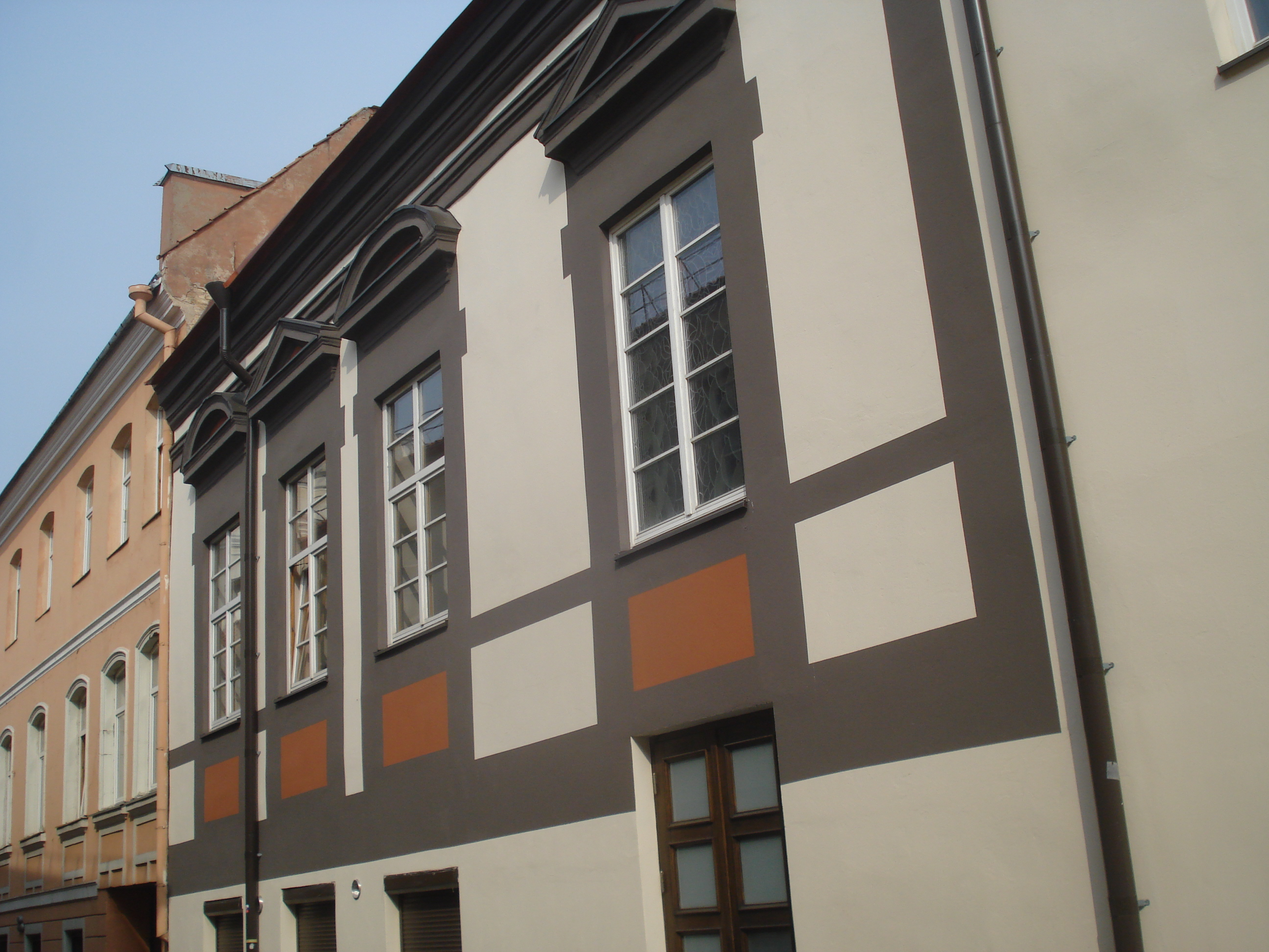 Юго-западный фасад южного корпуса дворца Поцеев с улицы Стиклю (Вильнюс)